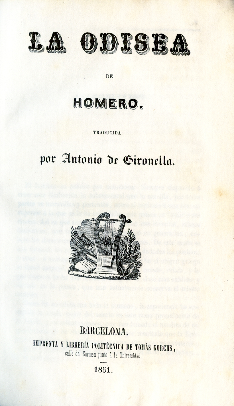 Portada de "La Odisea" traduïda al castellà per Antoni de Gironella (1851)